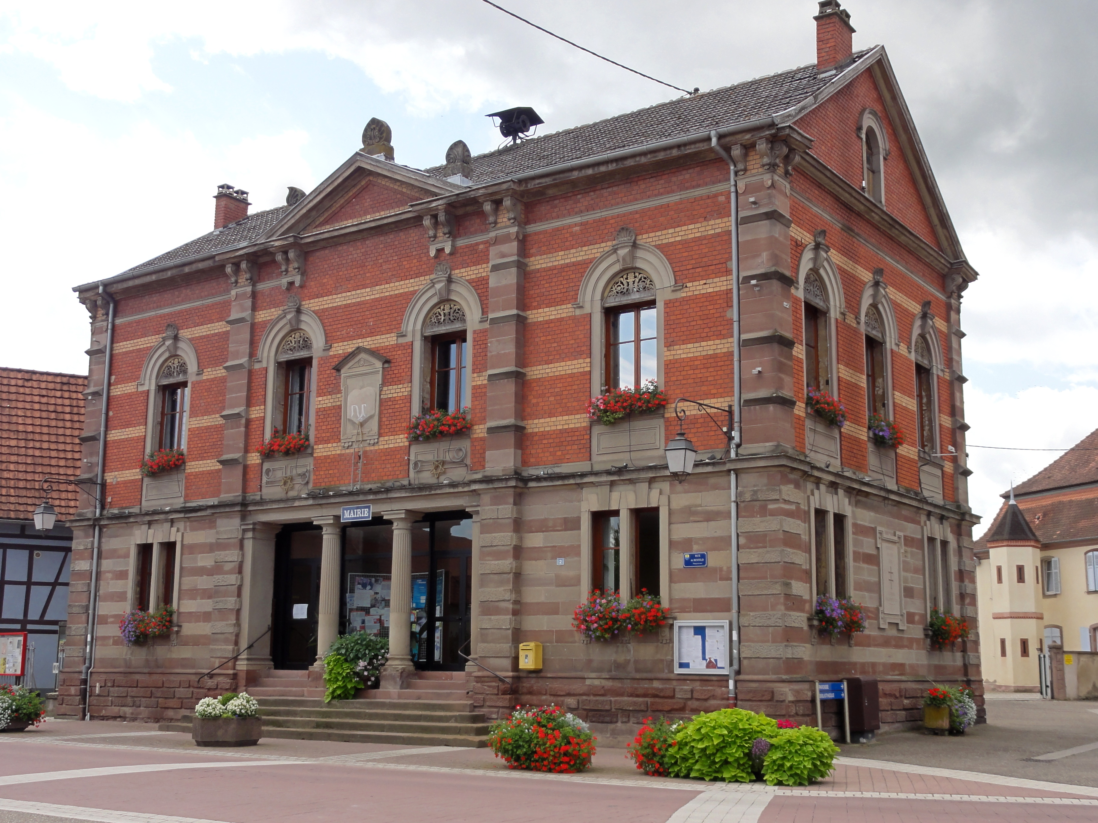 Alsace, Bas-Rhin, Kertzfeld, Mairie (XIXe).